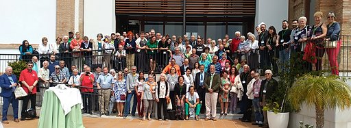 Malaga kongreso